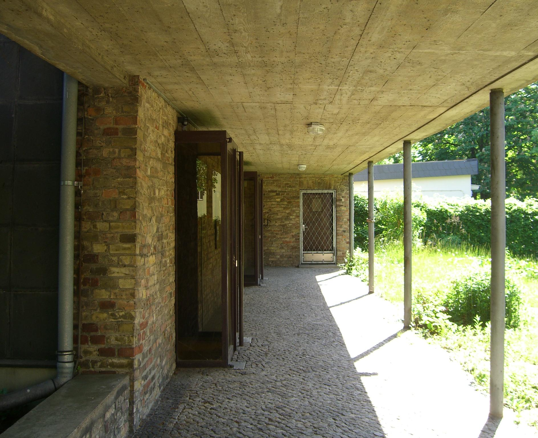 Michaelskirche Berlin-Schöneberg; Pergola zwischen Turm und Gottesdienstraum; Eingänge zum Gottesdienstraum links